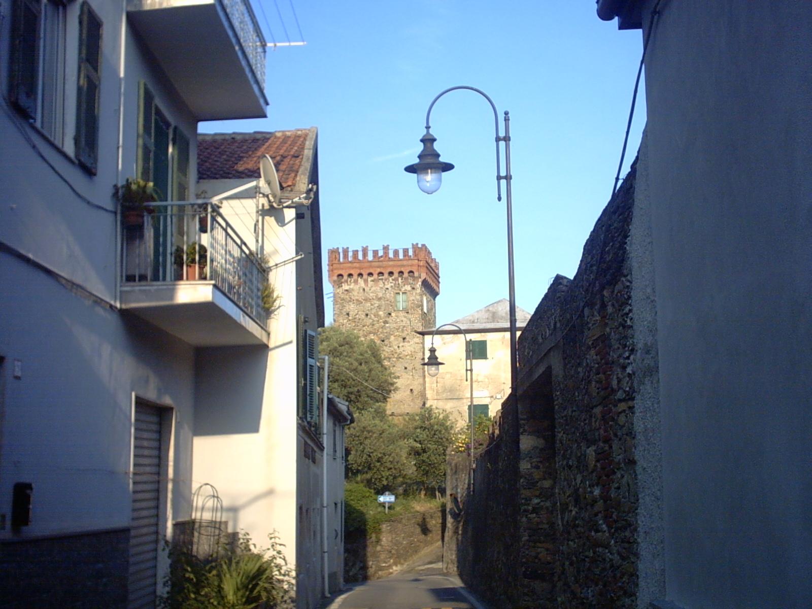 la torre di Lerca-Cogoleto (Genova)